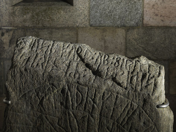 Foto: Nationalmuseet ved Roberto Fortuna